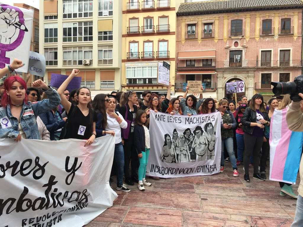 Plaza de la Constitución (Málaga) Protesta Sentencia "La Manada"